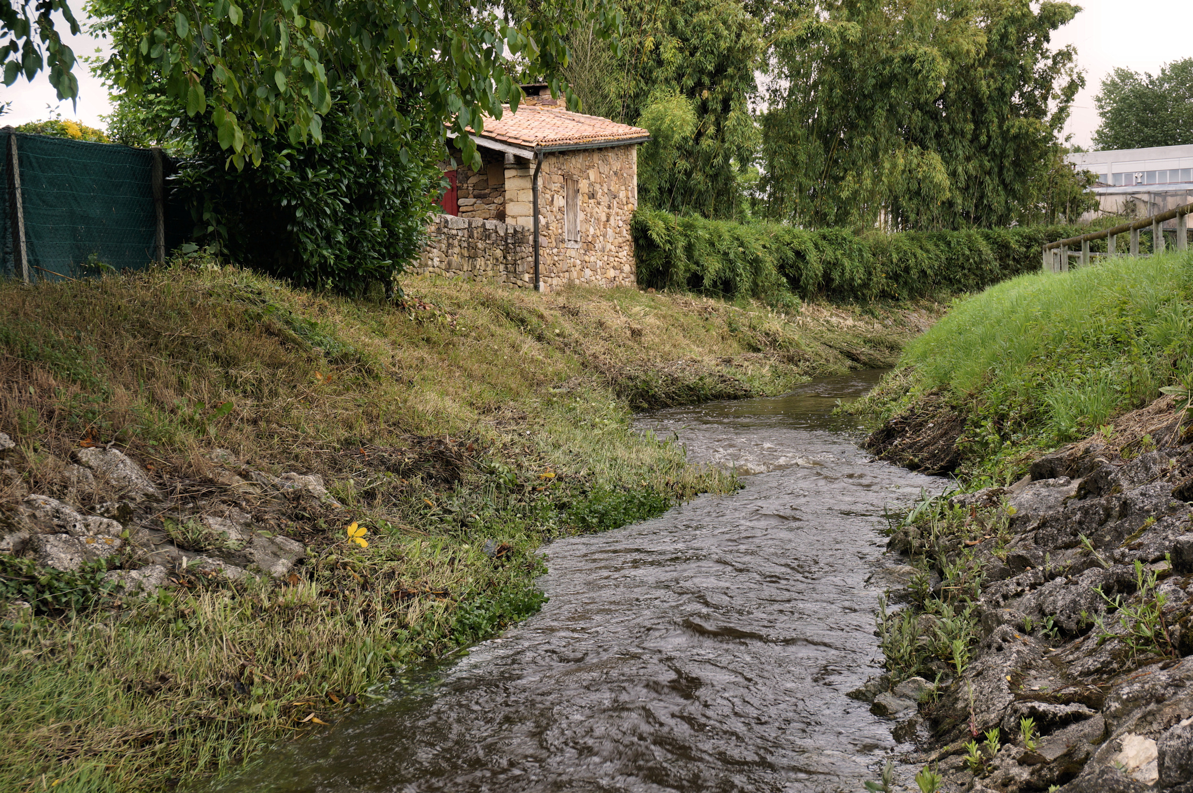 Ruisseau les Ontines à Mérignac en Gironde.